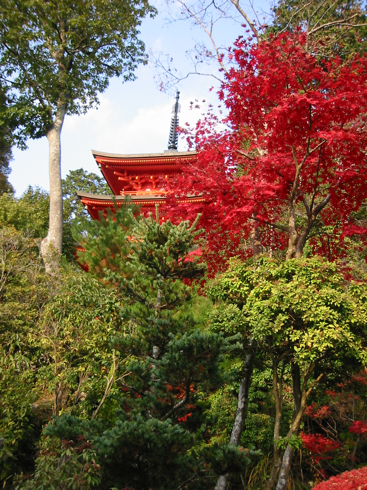 神戸 獨鈷山鏑射寺 三重塔